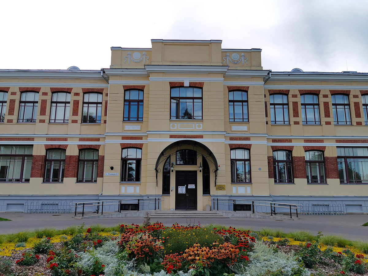 Maarjamõisa